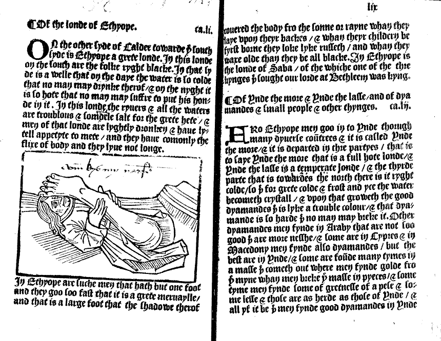 Here begynneth a lytell treatyse or booke named Johan Mau[n]deuyll knyght born in Englonde in the towne of saynt Albone (1499) Bild aus dem englischen Frühdruck des Jahres 1499, Äthiopien und Indien, Bild des Einfüßlers